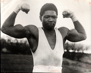 Une figure légendaire de la boxe sénégalaise, Battling Siki